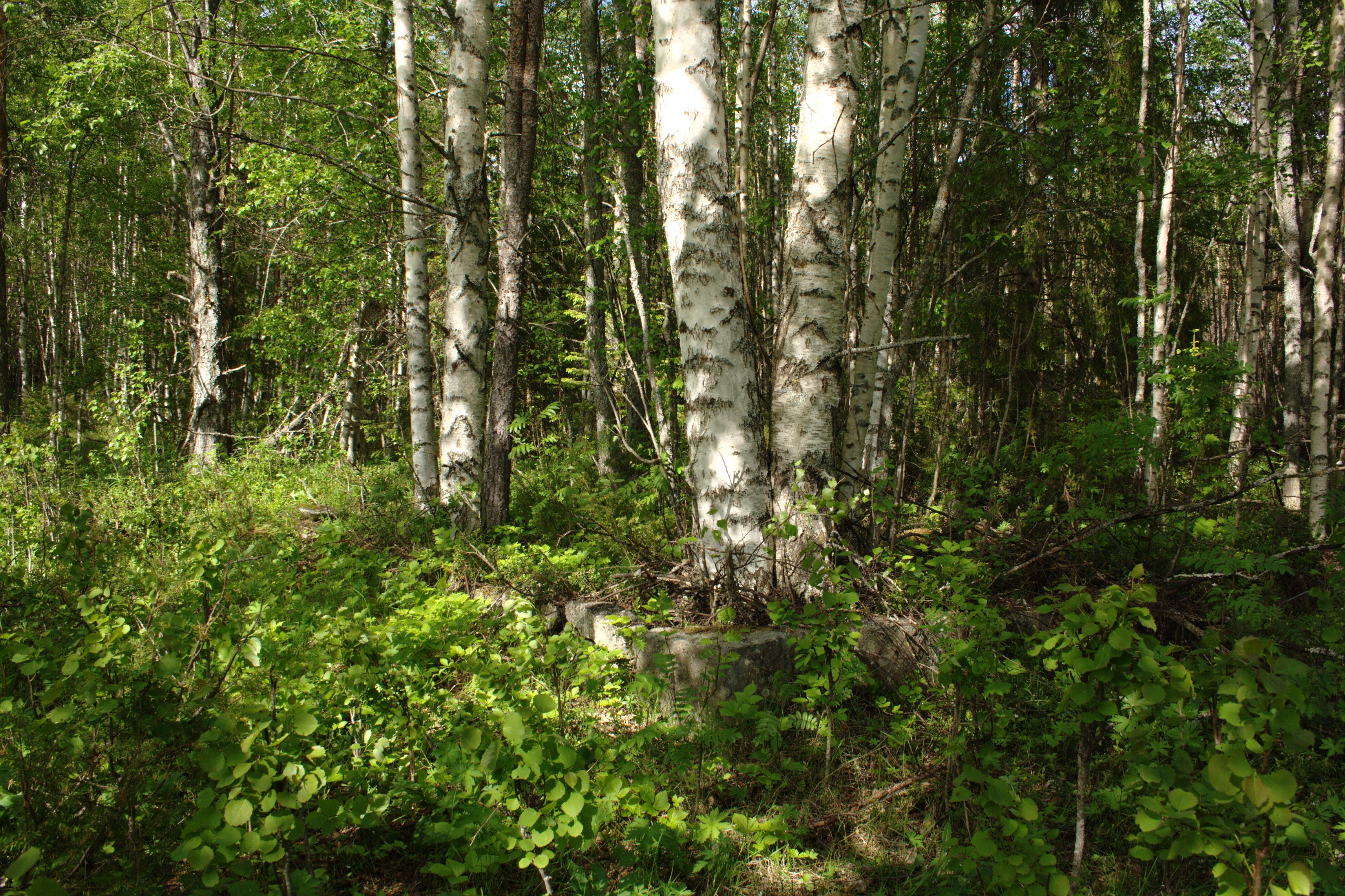 Grunden till kronolägenheten Månsbo